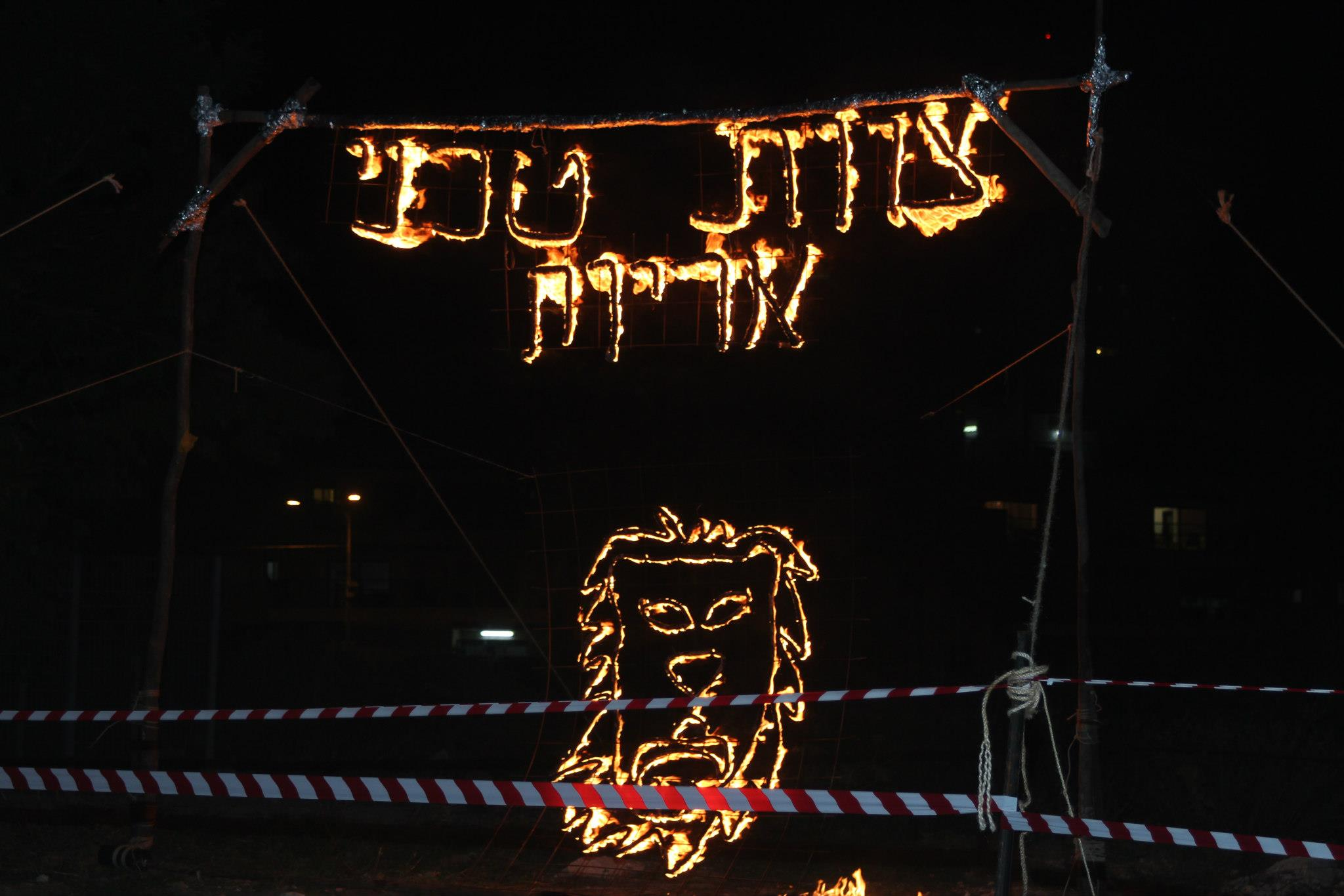 טקס אש סניף מכבי צעיר מודיעין